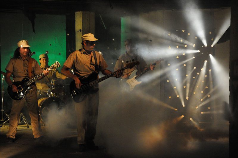 Rodaje del clip de "Como Quieras" de Monalisa